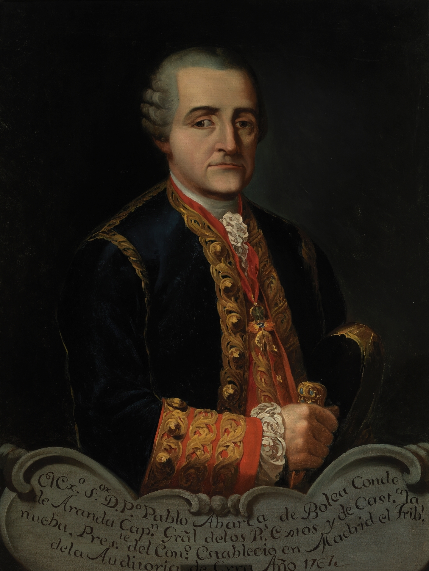 Retrato del militar y político español Pedro Pablo Abarca de Bolea (1719-1798), X conde de Aranda. Esta obra es una copia decimonónica del retrato del conde de Aranda pintado por Joaquín Inza y conservado en la Colección de la Casa de Alba.